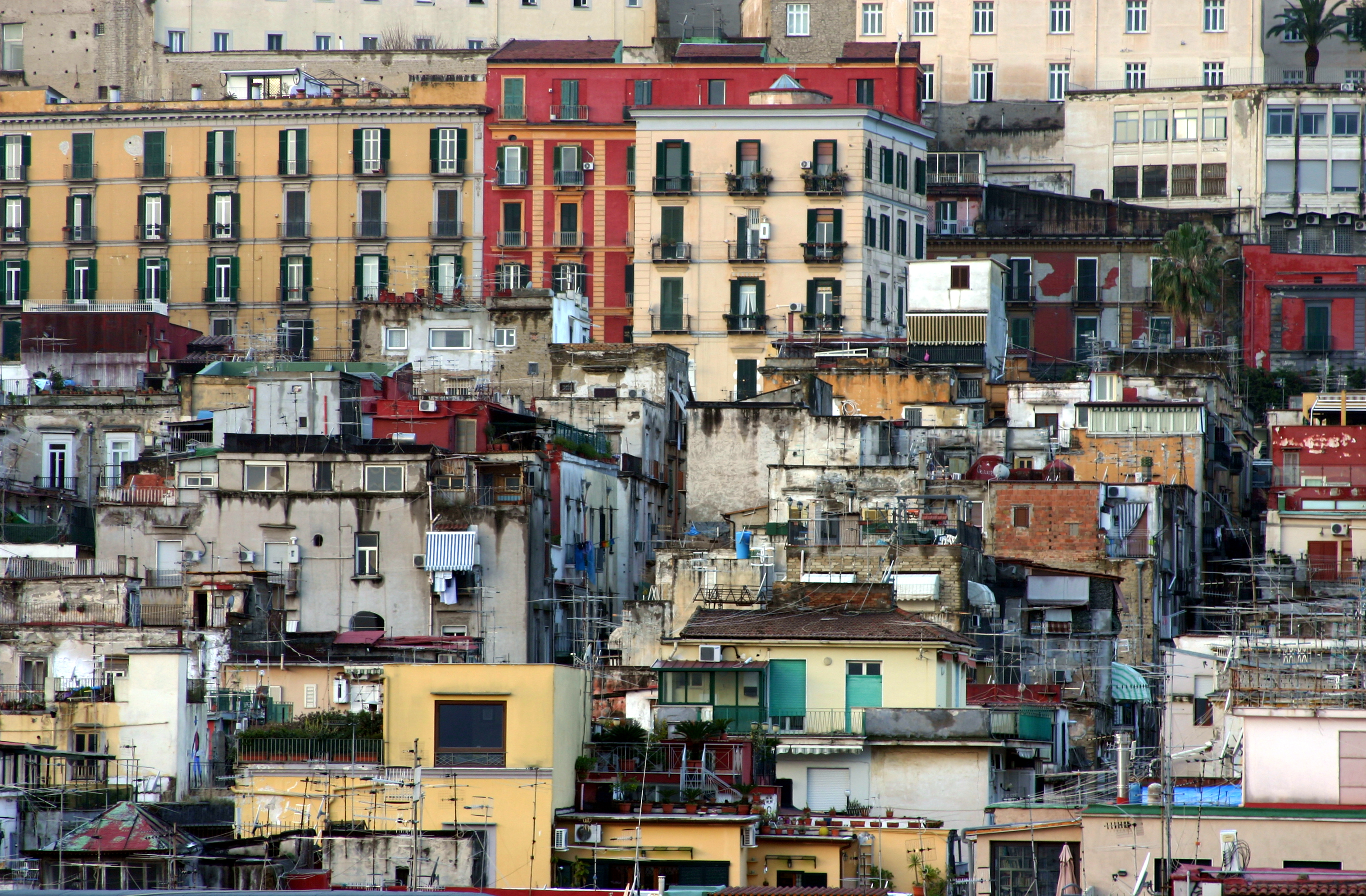 Vistas a partir do Renaissance Mediterraneo, em Nápoles